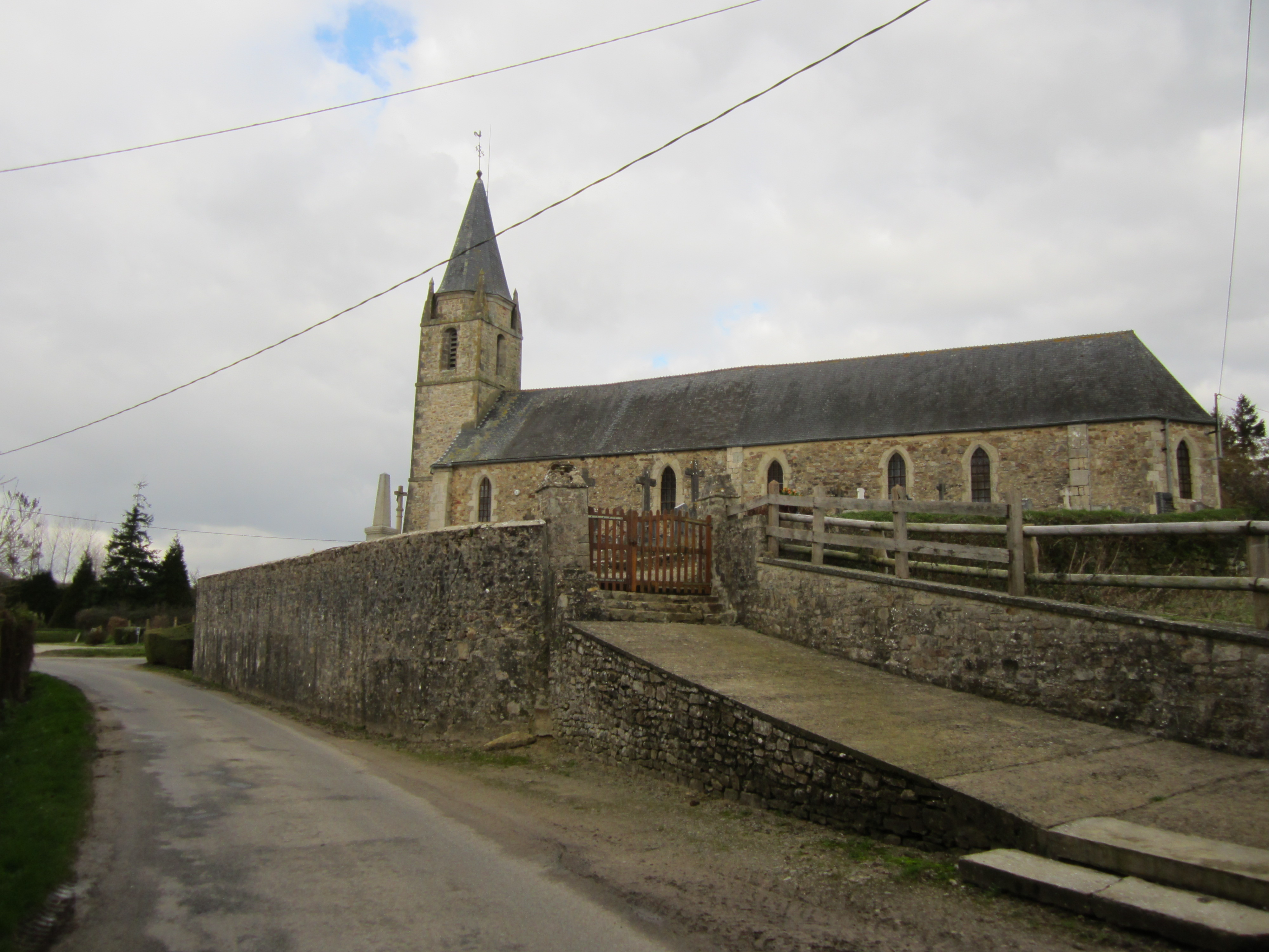 église Sainte-Marie de Saint-Martin-d'Audouville